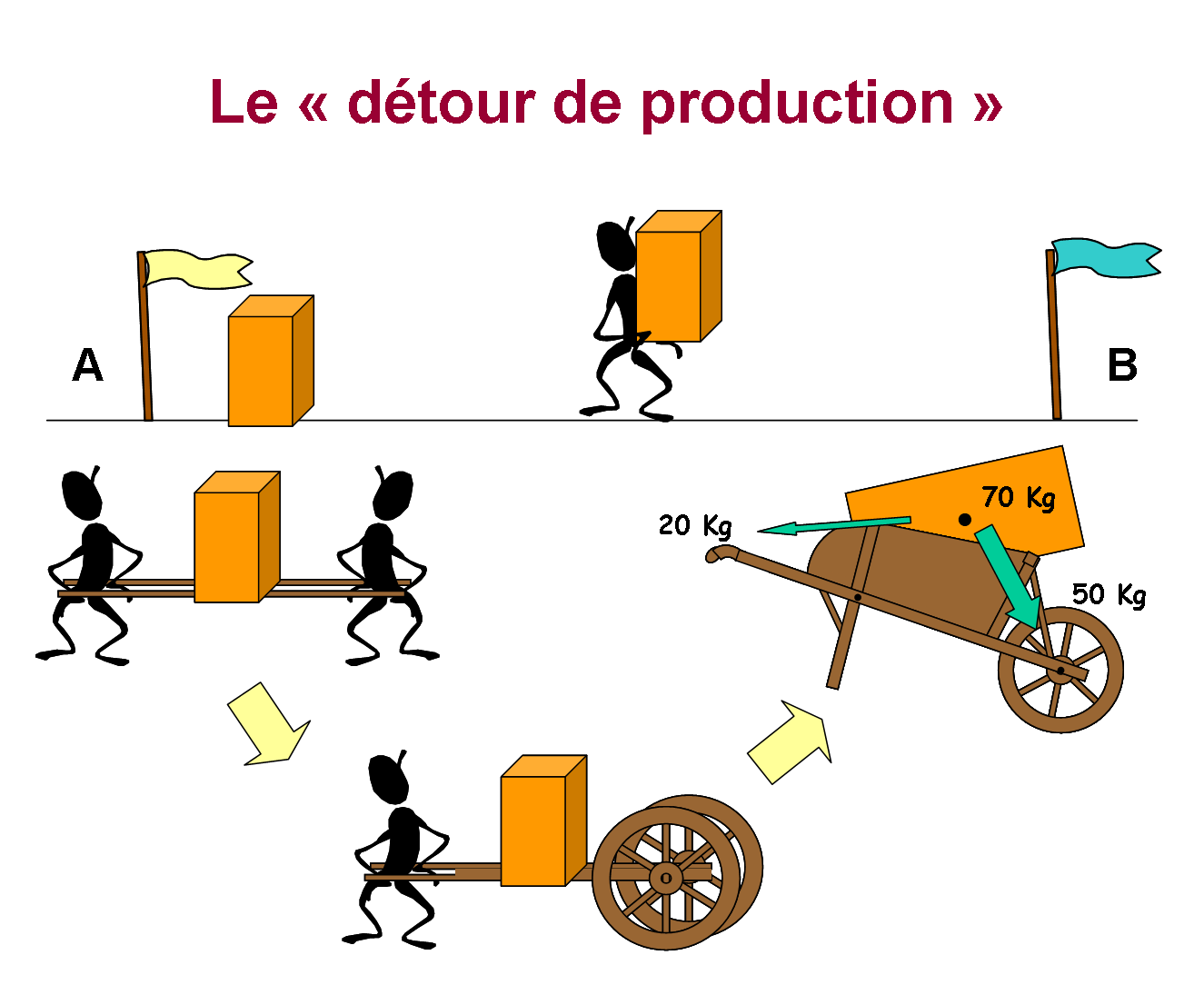 Combinaison d'innovations et de concepts aboutissant à un objet nouveau : la brouette